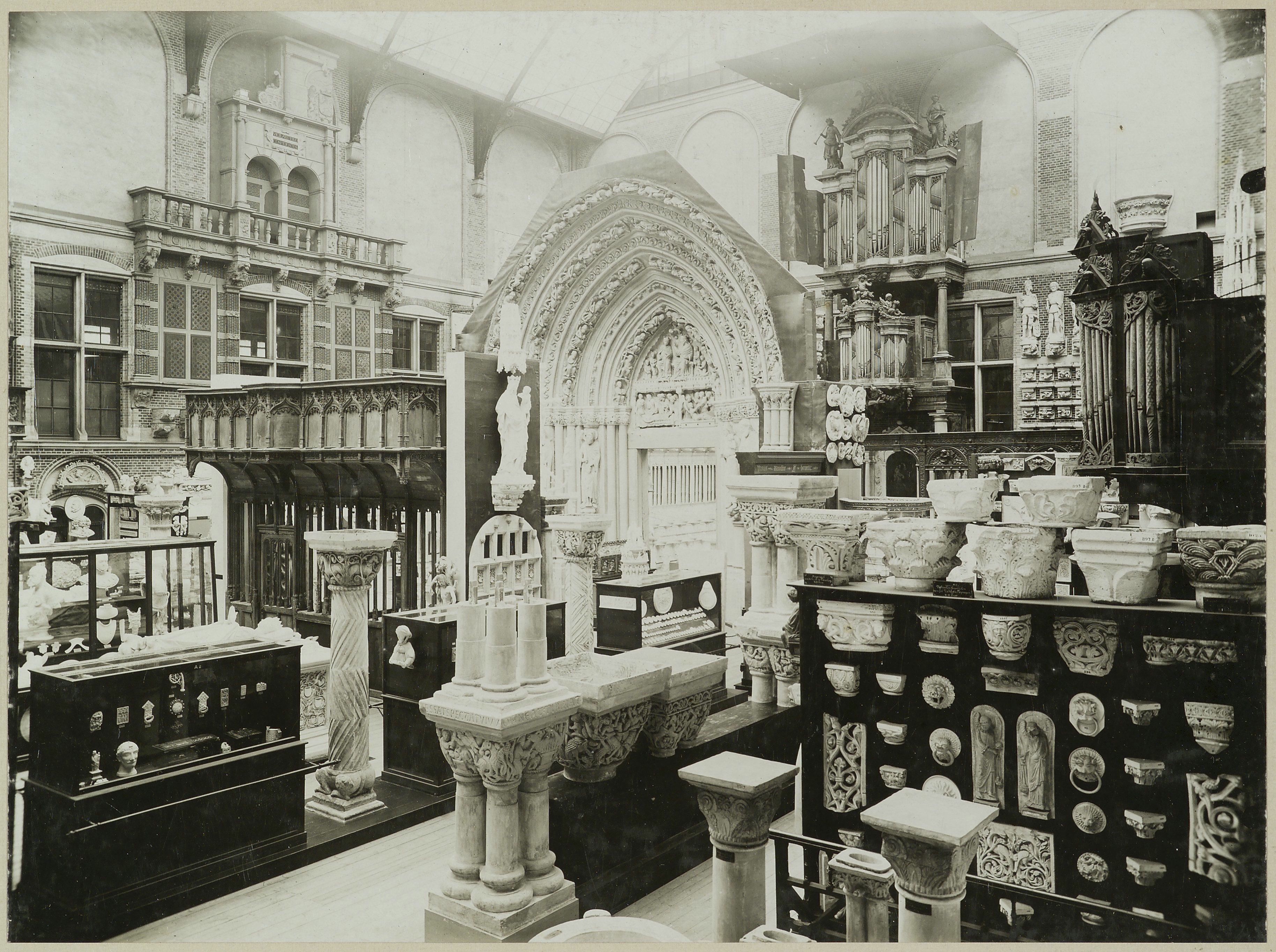 Rijksmuseum: binnenhof met gipsafgietsels van bouwfragmenten en interieuronderdelen, deels afkomstig uit Maastricht (midden voor: kapitelen oostkoor O.L.-Vrouwekerk; midden achter: Bergportaal St-Servaaskerk (opmerking: negatiefnummer vervallen)